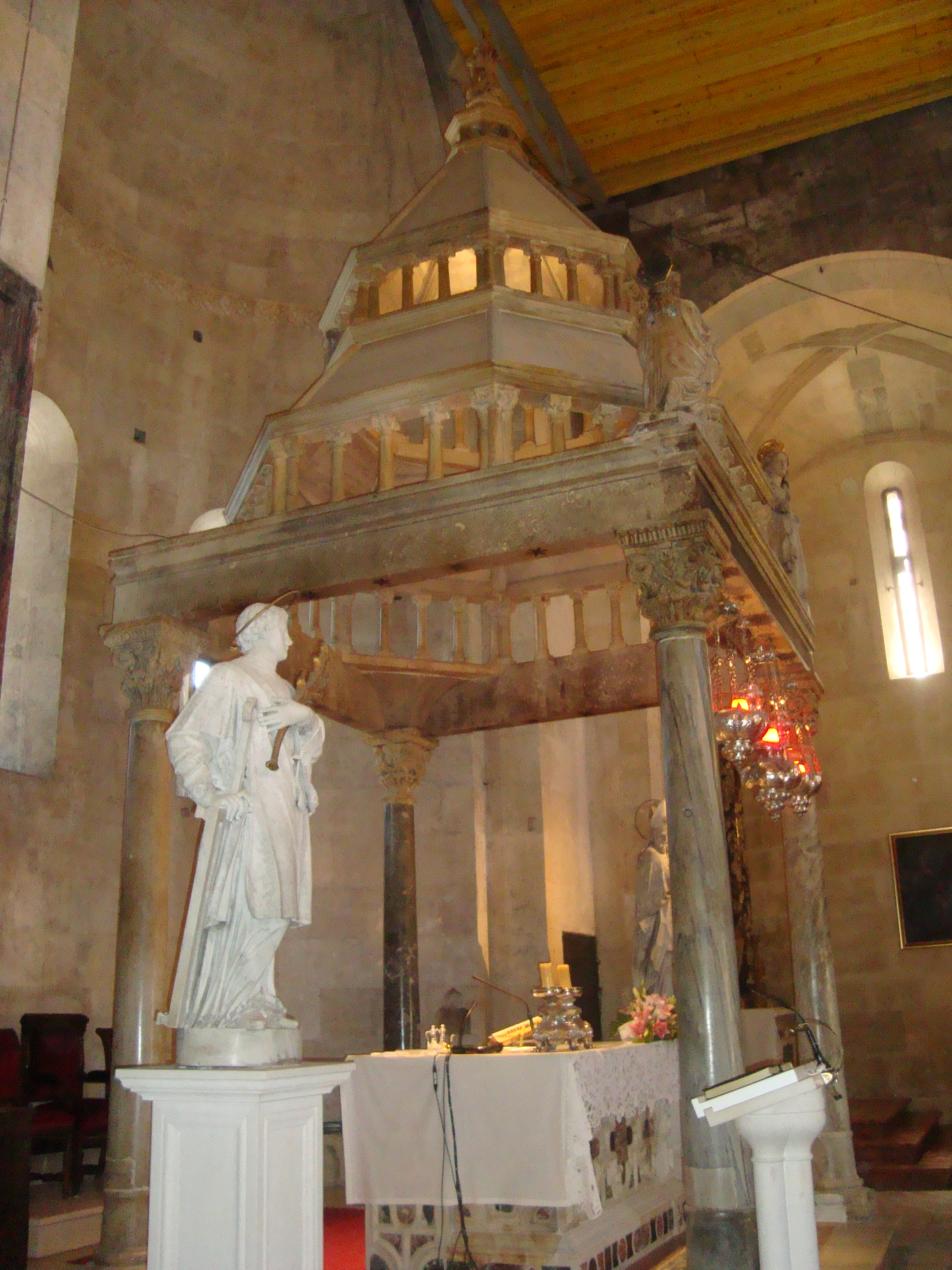 Maître autel de la cathédrale Saint-Laurent de Trogir. Il est surmonté d'un baldaquin du 14e siècle figurant l'Annonciation.